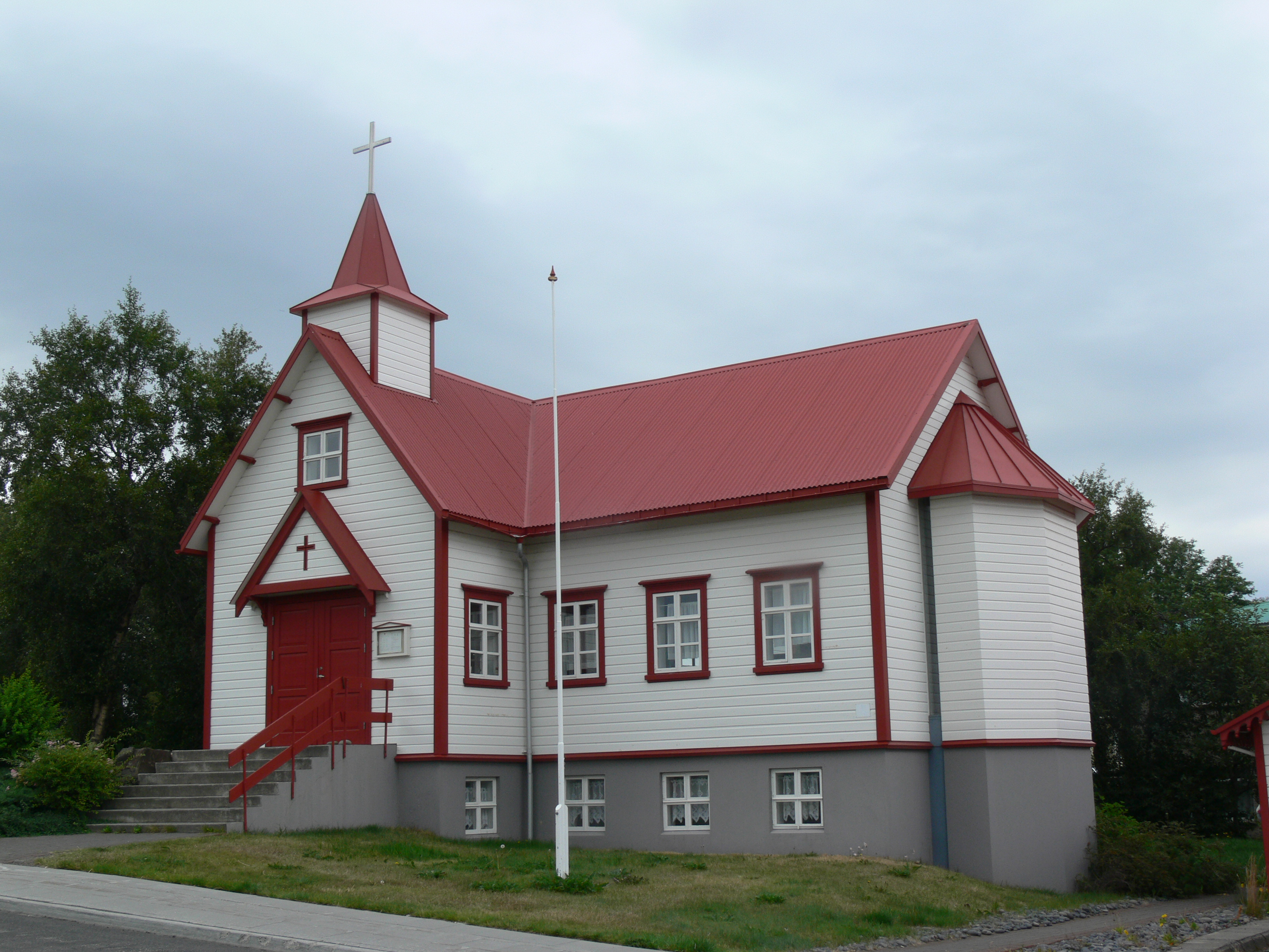 Katholische Kirche St. Peter in Akureyri